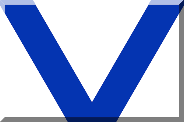 Bianco con V Blu